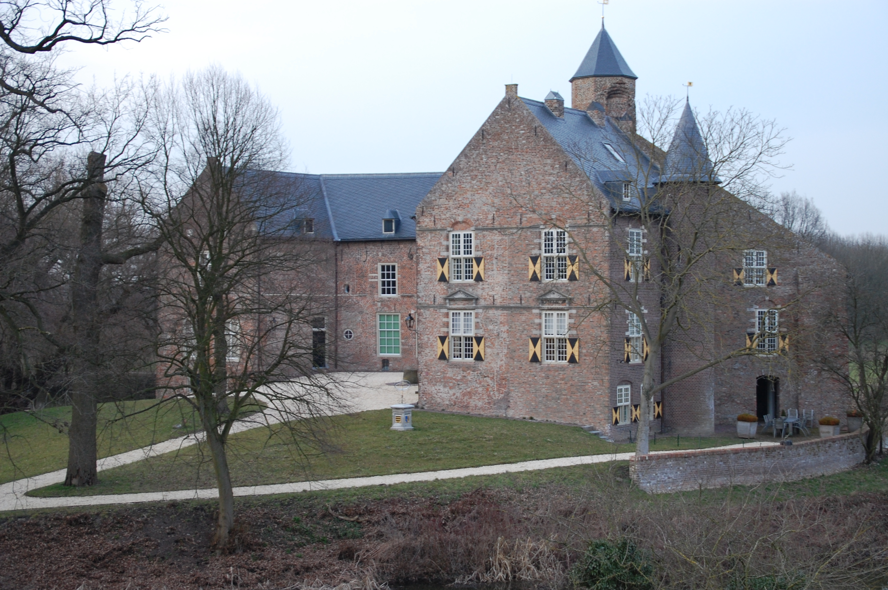 Kasteel Waardenburg Rapportage Rijksmonument (